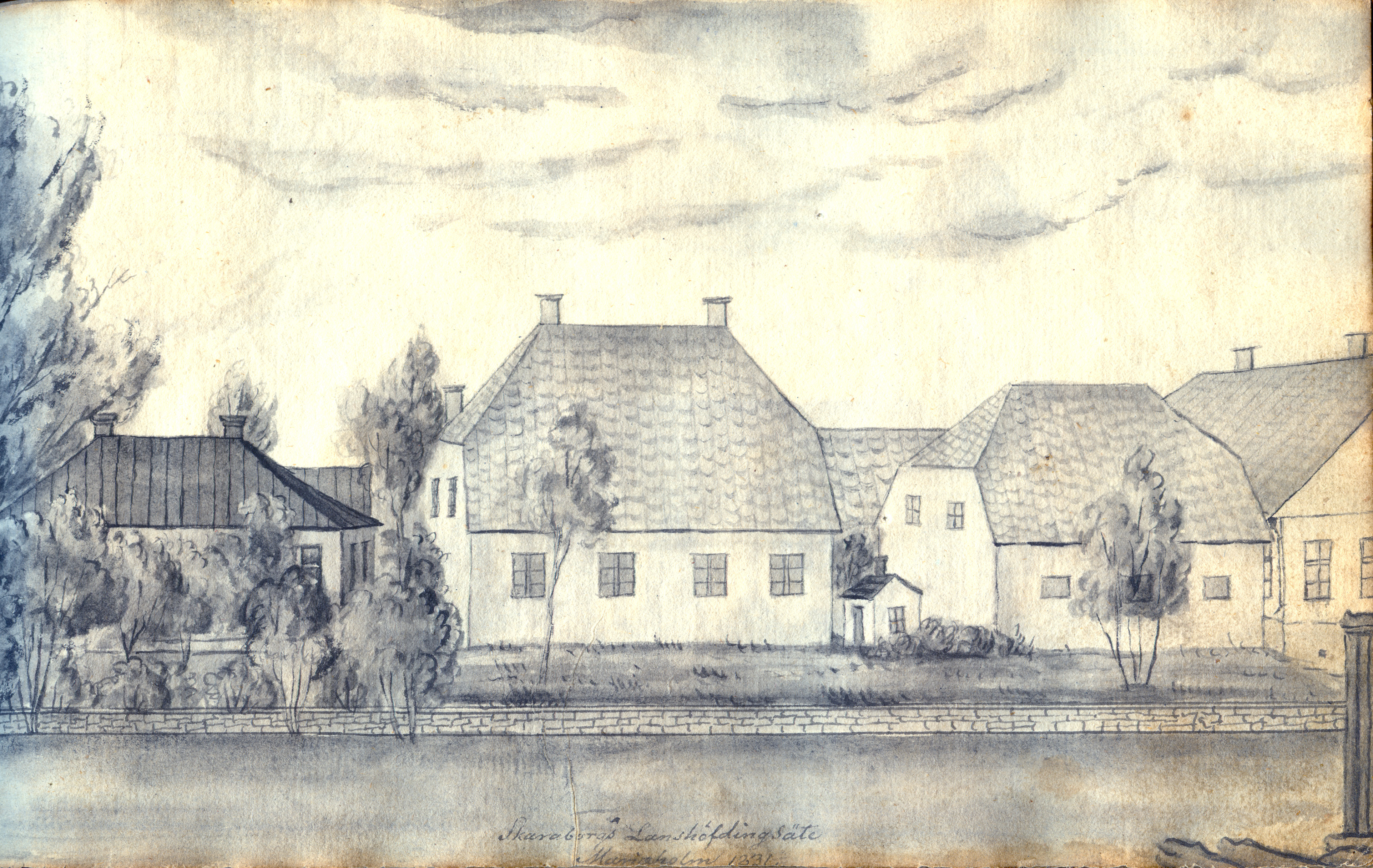 Laverad tuschteckning av Skaraborgs landshövdingeresidens Marieholm i Mariestad, daterad 1831 Källa: Stifts- och landsbiblioteket i Skara: MS Geografi Västergötland 1, bild 19